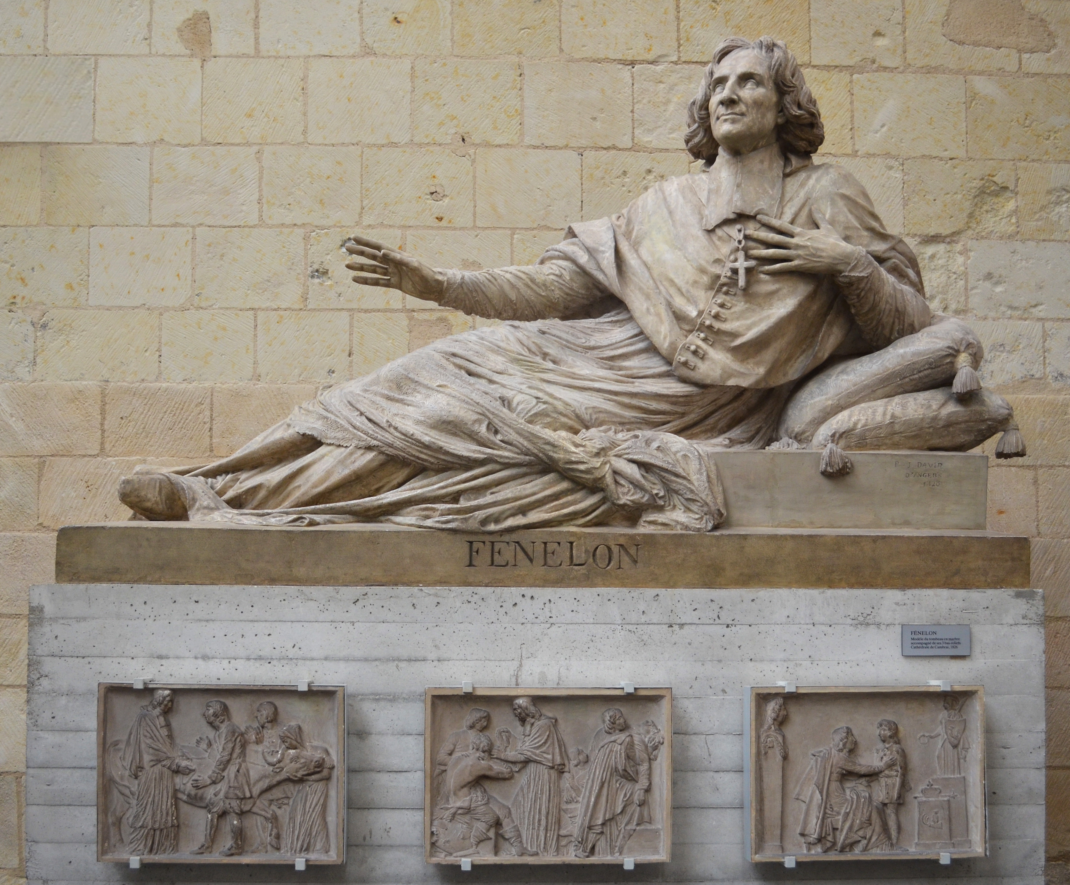 Modèle du tombeau en marbre de Fénelon accompagné de ses 3 bas-reliefs pour la Cathédrale de Cambrai par David d'Angers - Musée David d'Angers - Angers (Maine-et-Loire)